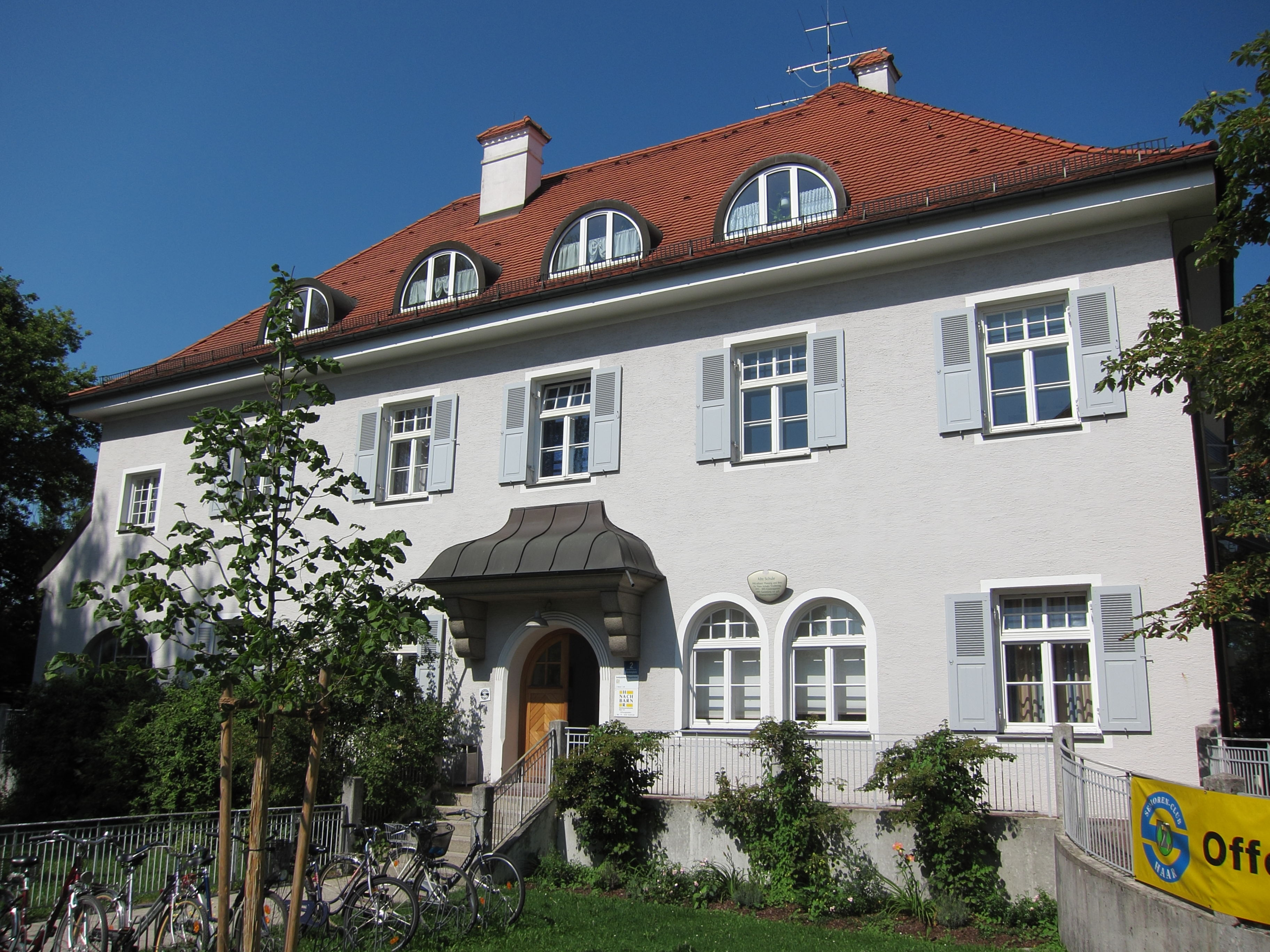 Haar, Kirchenplatz 2; Ehem. Schulhaus, zweigeschossiger Putzbau mit Walmdach, erstes Viertel 20. Jh.